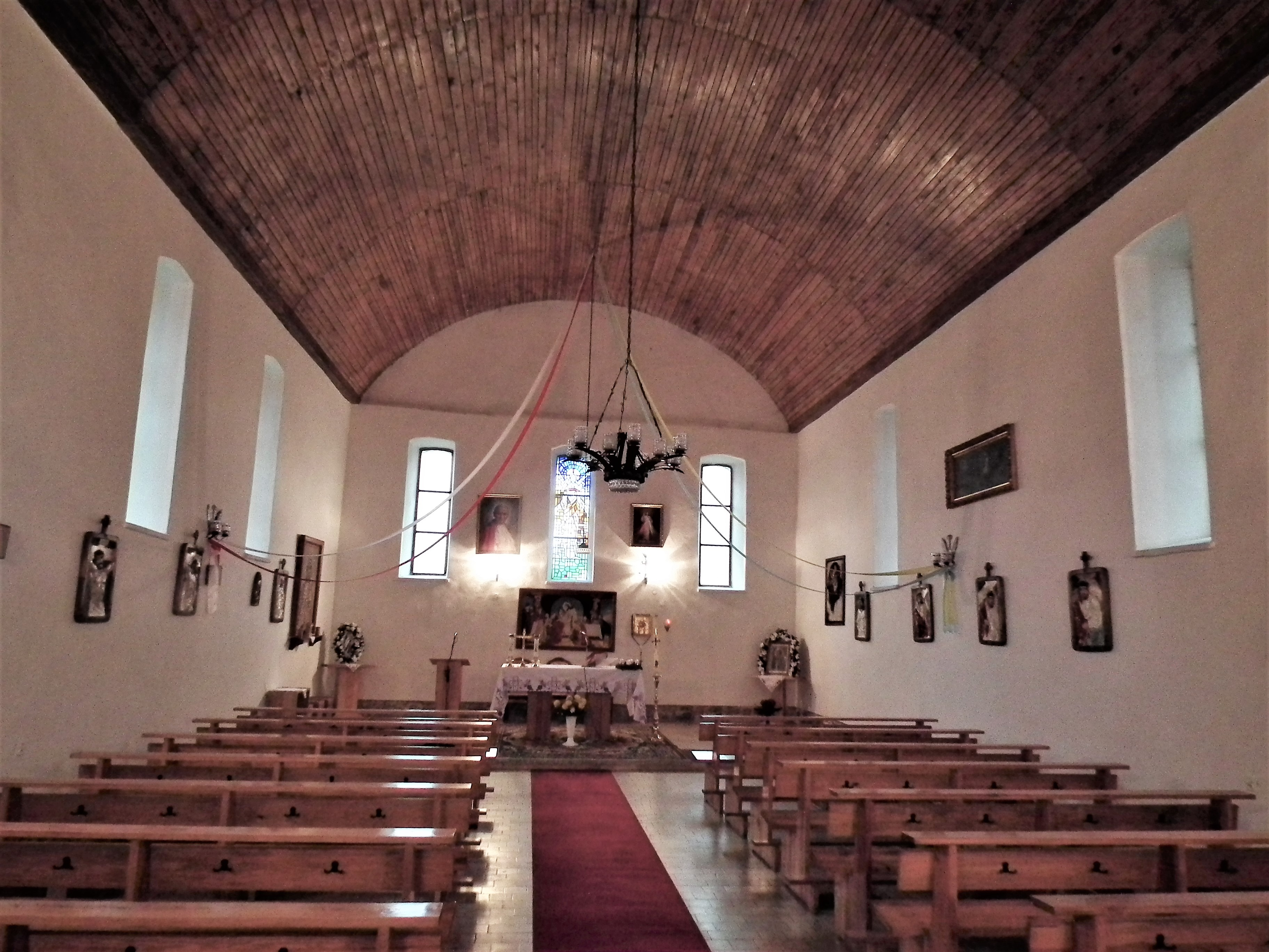 Kościół Bożego Ciała w Kamieńcu na lewobrzeżu odrzańskim, powiat policki.